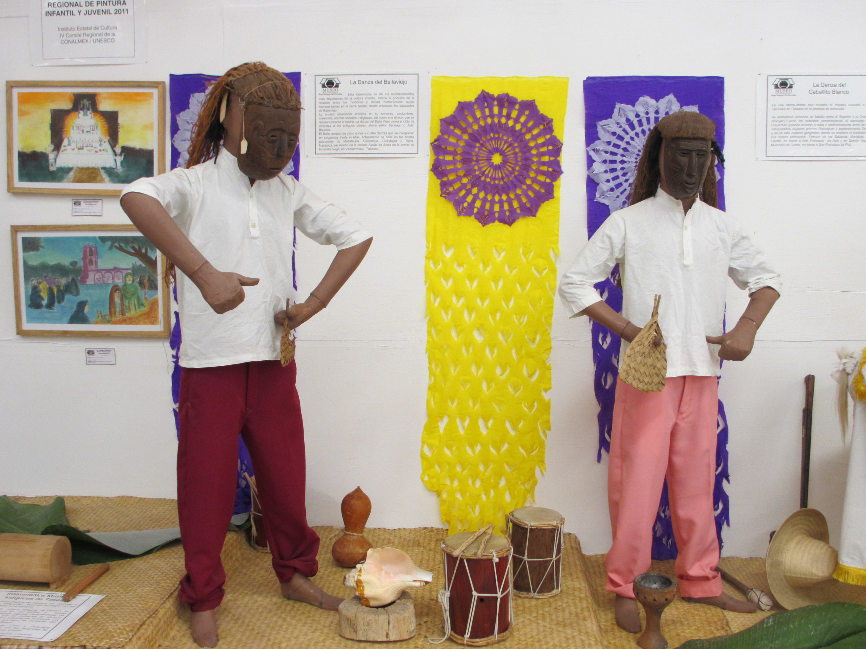 Indumentaria utilizada por los participantes en la danza del "Bailaviejo", actualmente se baila en las fiestas patronales de las comunidades de Mazateupa, Oxiacaque, Guaytalpa y Tucta en el municipio de Nacajuca Una de las danzas más importantes y autóctonas del estado de Tabasco, México.